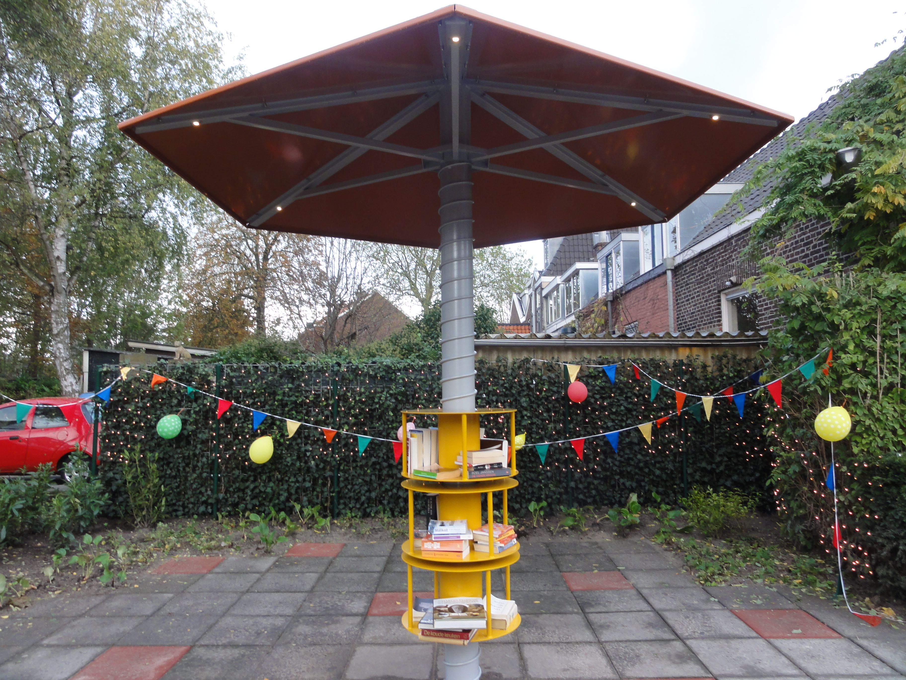 Boekenboom geplaatst bij bij Groenhoven / Topaz, Groenhovenstraat, Leiden.